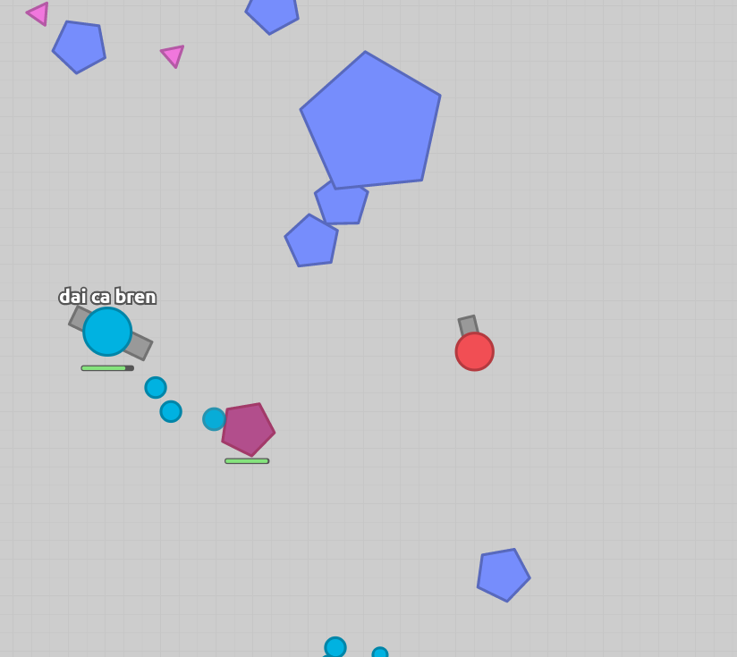 diep.io游戏截图大五边形